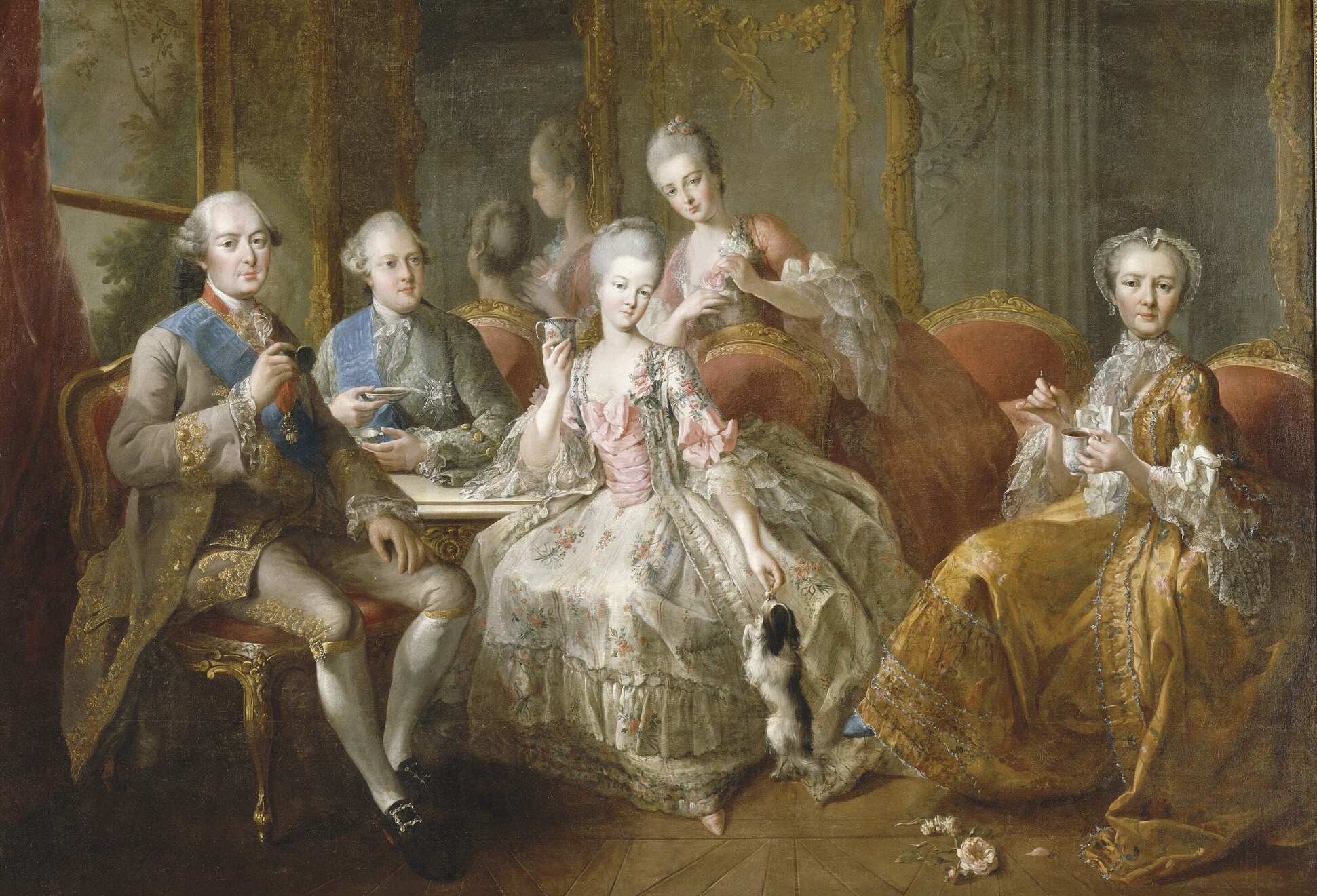 Scène d'intérieur : une famille à l'heure du chocolat. Salon de la famille de Louis Jean Marie Bourbon duc de Penthièvre, amiral, homme assis, de trois-quarts ; Louis Alexandre prince de Lamballe, homme assis, de trois-quarts ; Savoie Marie Thérèse Louise, princesse de Lamballe, femme assise, de trois-quarts, avec son chien, reflet dans le miroir ; Louise Marie Adélaïde de Bourbon, femme en pied, de trois-quarts, reflet dans le miroir ; comtesse de Toulouse, femme assise, de trois-quarts